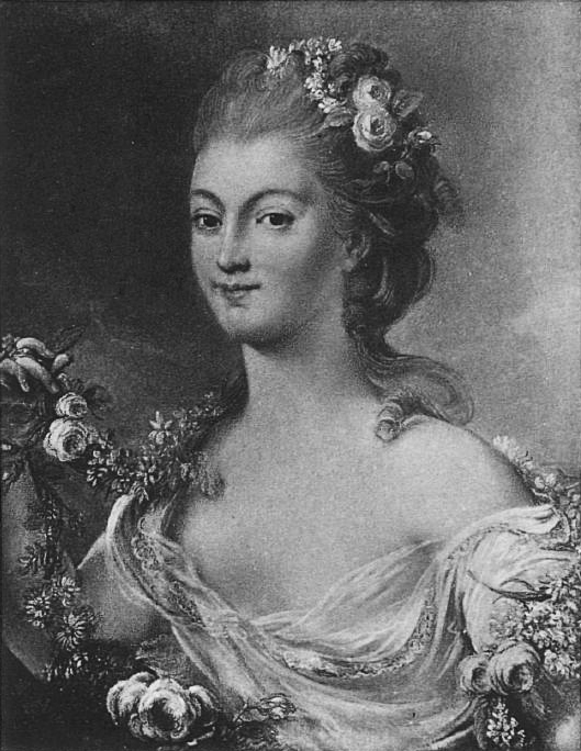 Прасковья Матвеевна Демидова, ур. олсуфьева (1730—1813)